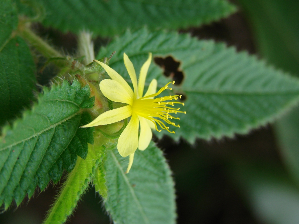 Corchorus hirtus - MALVACEAE Parque Olhos D'Água - Brasília - DF - Brasil.